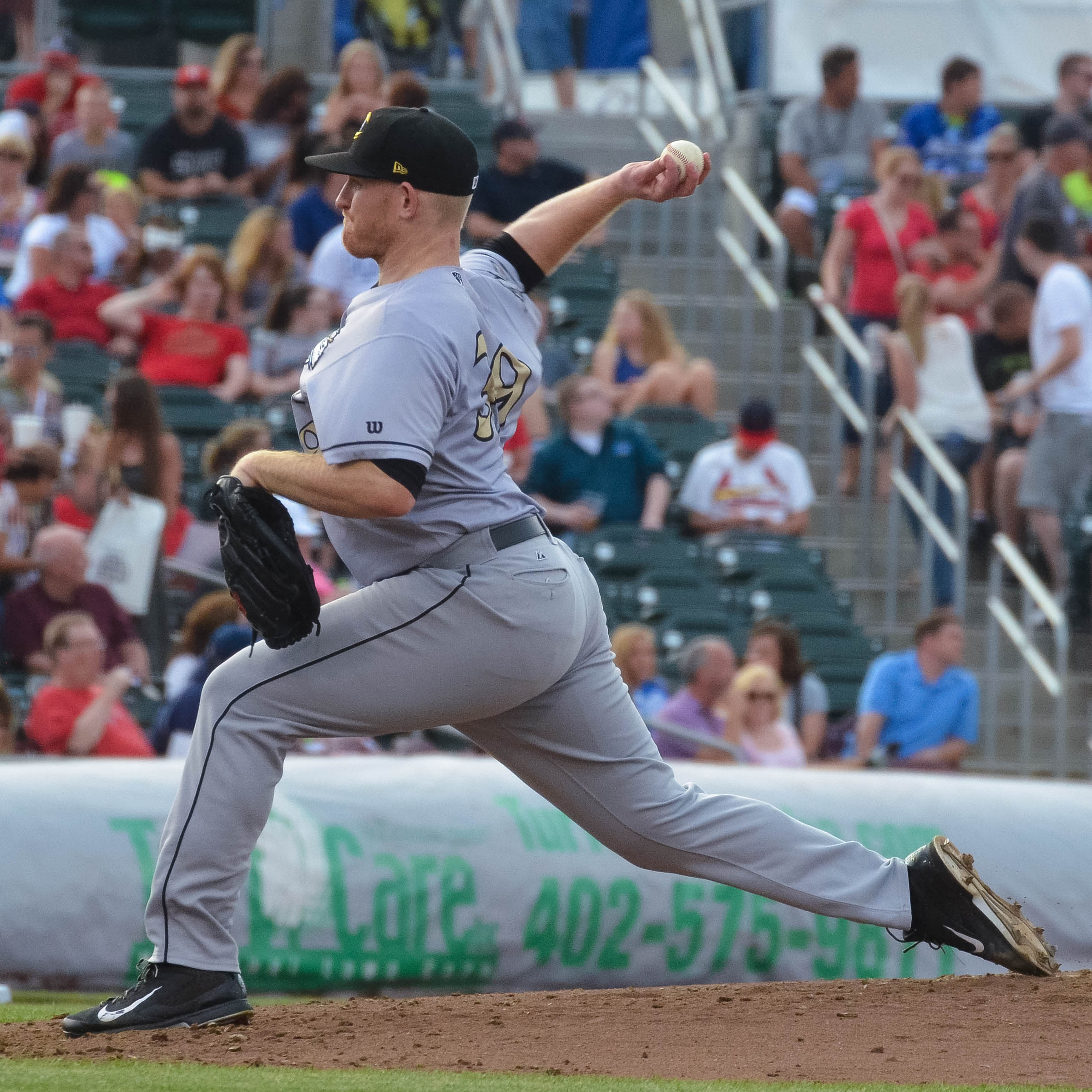 Erik Johnson